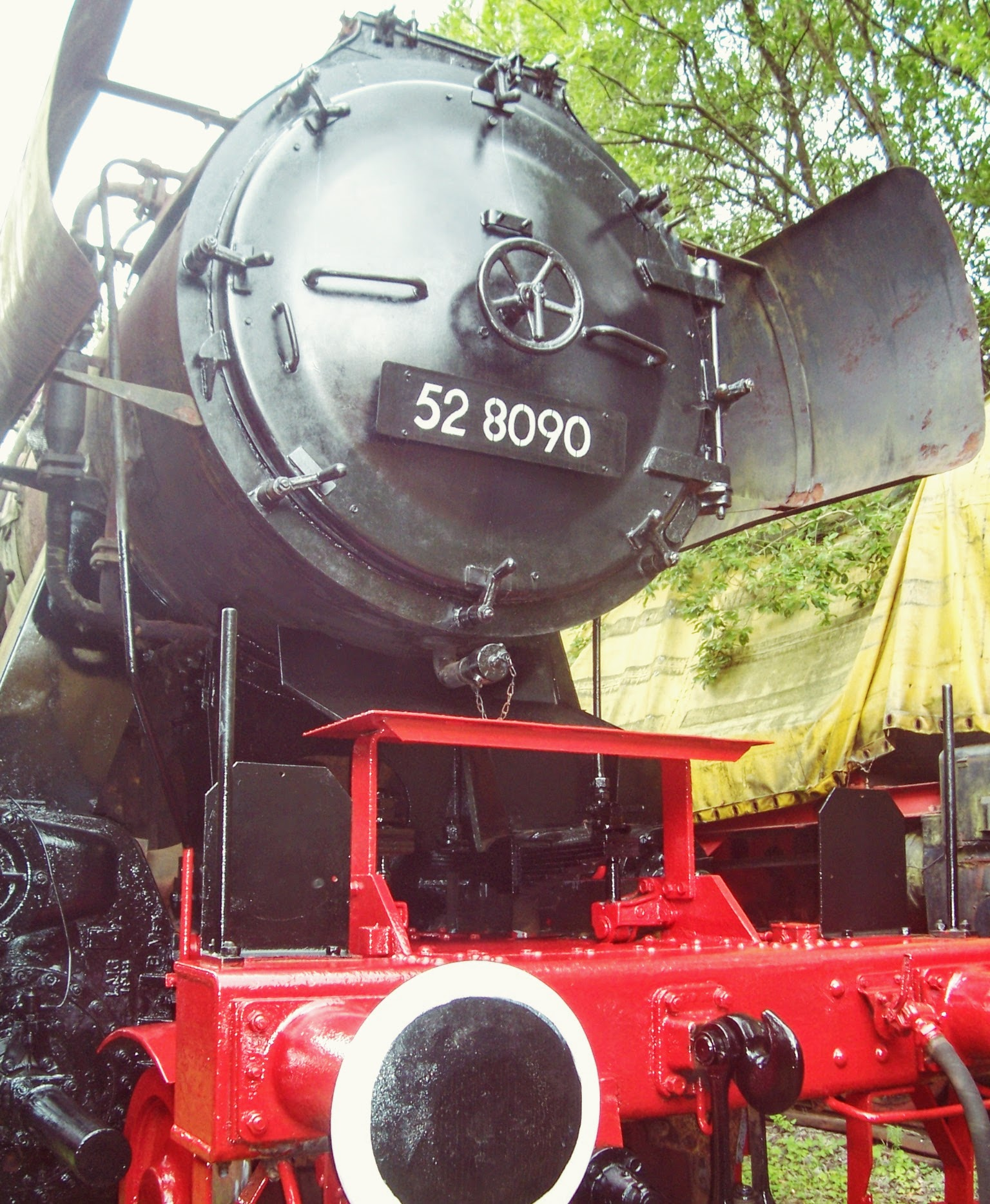 Dieses Bild zeigt die Dampflok 52 8090 im Dampflokmuseum Hermeskeil in teilrestauriertem Zustand.